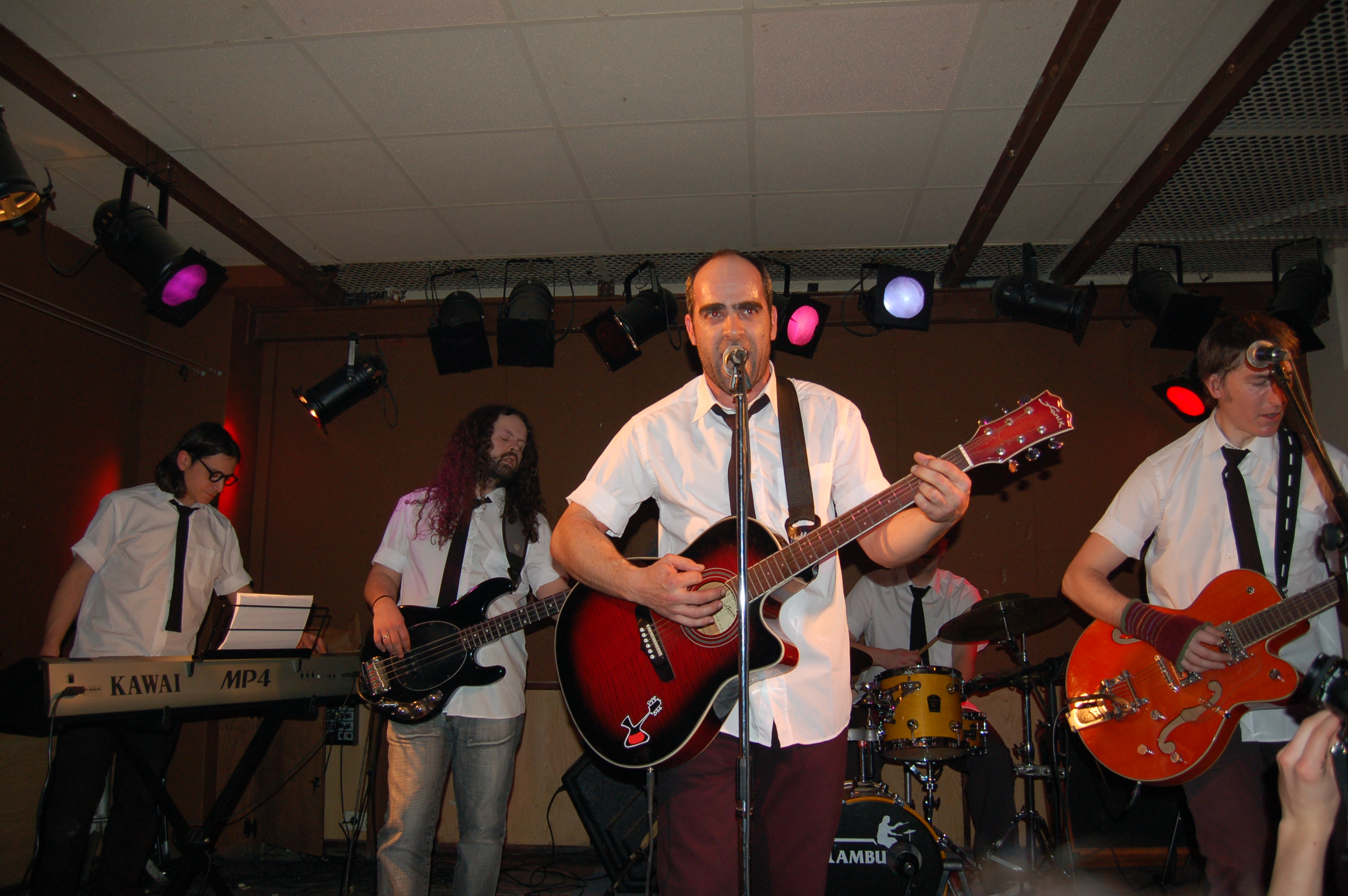 A banda The Ellas en concerto na sala La Fábrica de Chocolate de Vigo